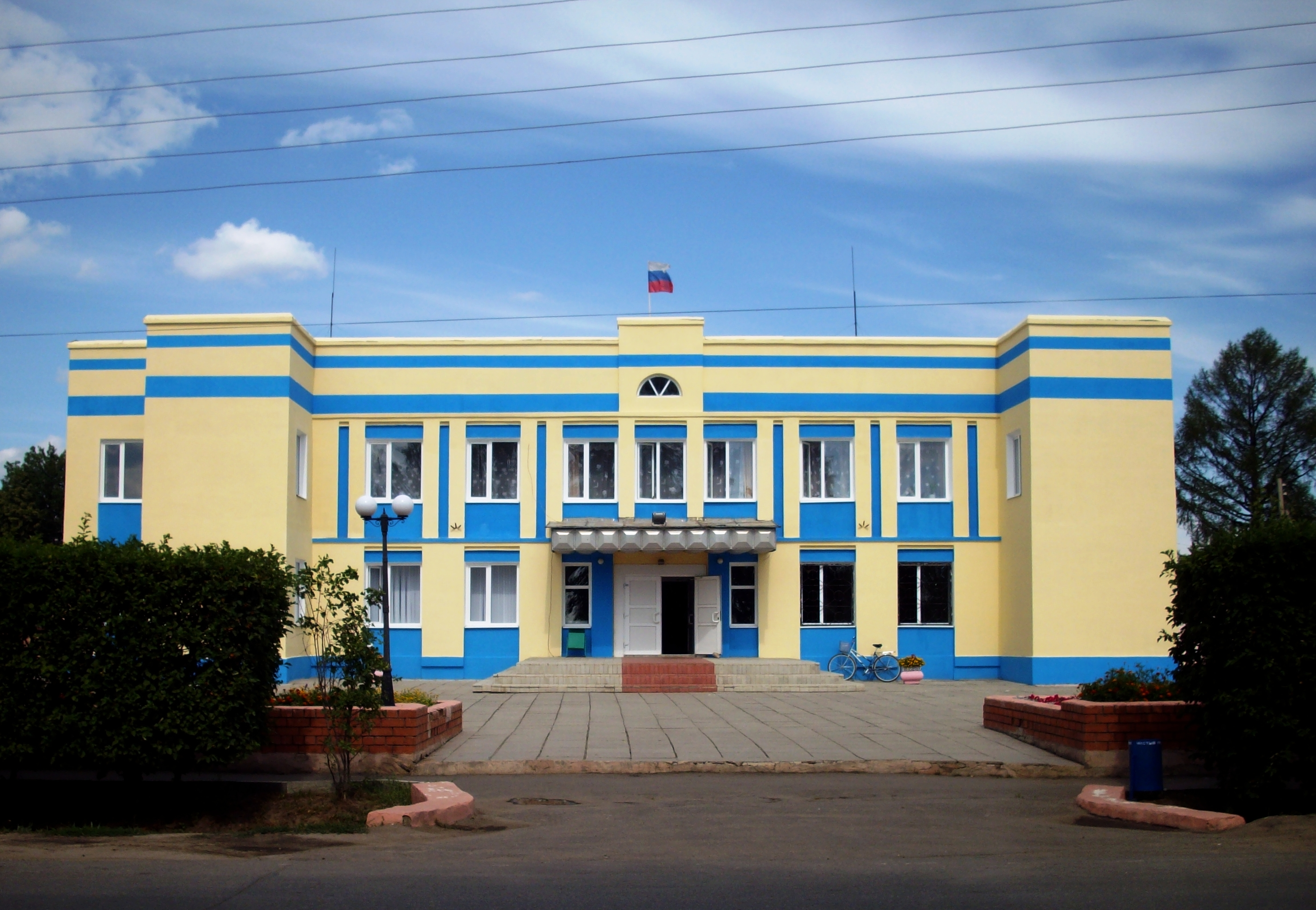 Здание Шарангской поселковой администрации